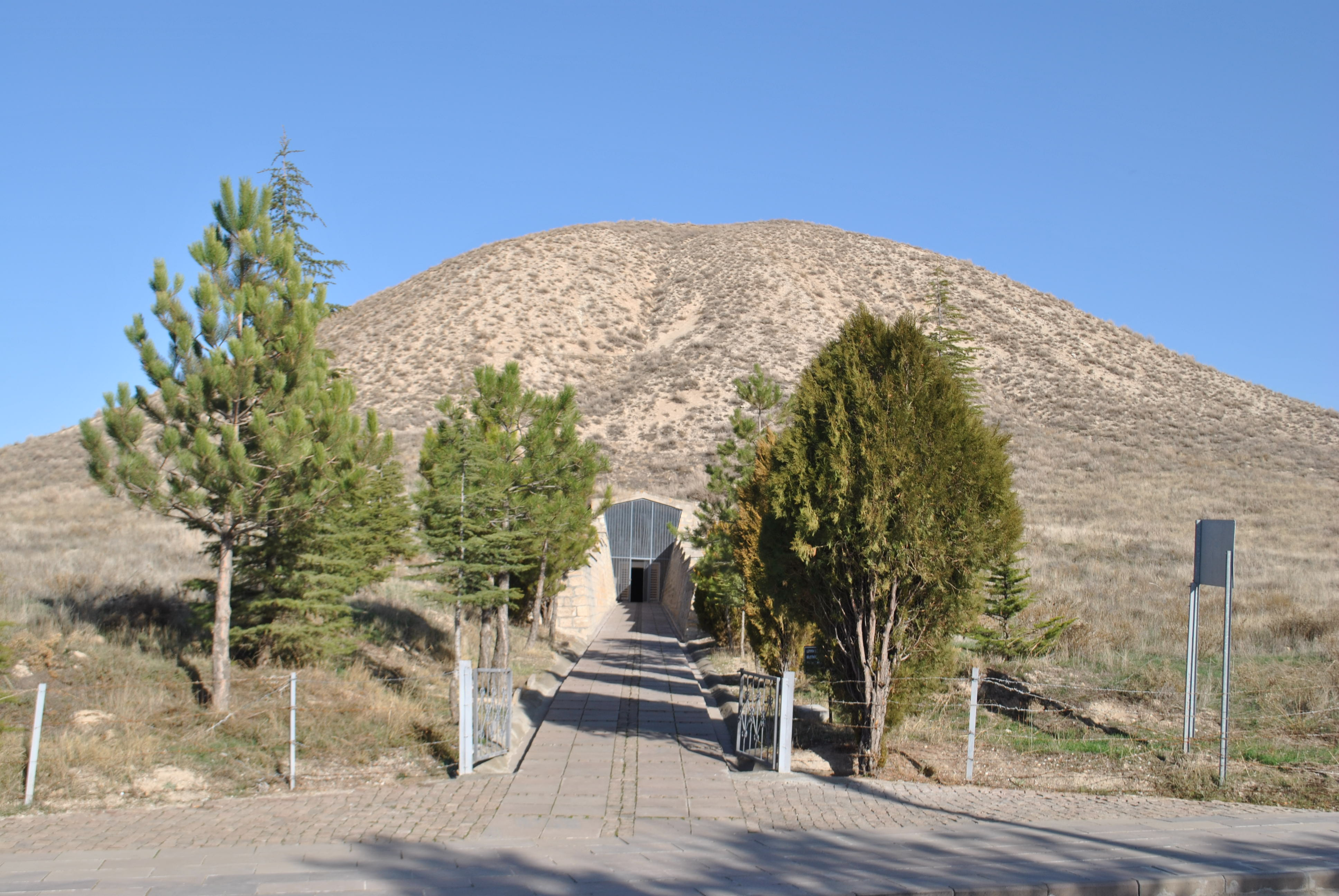 Gordion Müzesi, Ankara, Türkiye